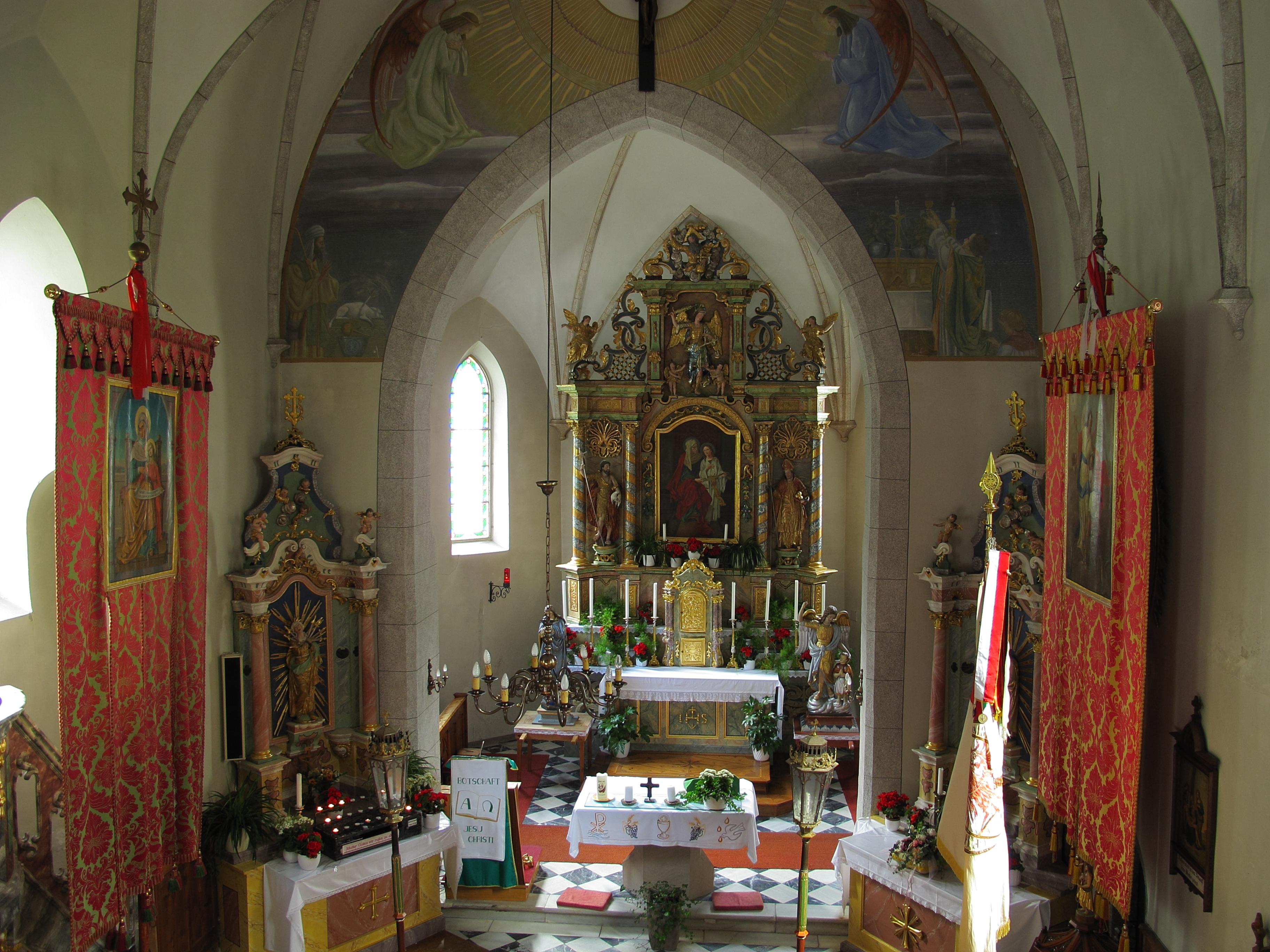 Karthaus im Schnalstal (Südtirol): Kirche St. Anna, Innenansicht